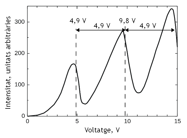 Gràfic amb les dades obtingudes a l'experiment de Franck-Hertz el 1914